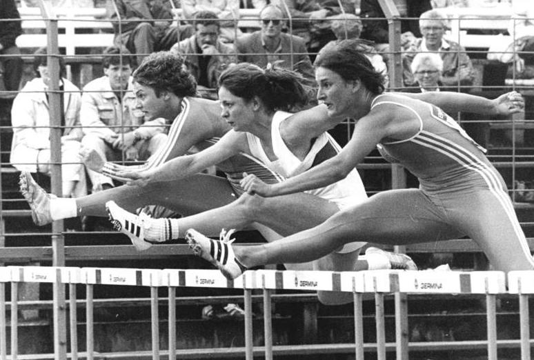 Cornelia Oschkenat, Heike Thoelo, Kerstin Knabe ADN-ZB Thieme 31.5.86 Bez. Gera: Saisonauftakt der Leichtathleten in Jena- Bei der ersten Qualifikation für die Europameisterschaften siegte die Berliner Dynamo-Läuferin Cornelia Oschkenat (r.) über 100 m Hürden in sehr guten 12,68 s, die in diesem Jahr noch niemand in der Welt erreichte. 2.v.r. Heike Thoelo (SC Magdeburg- 2.Platz), l. Kerstin Knabe (SC DHfK Leipzig- 3. Platz).